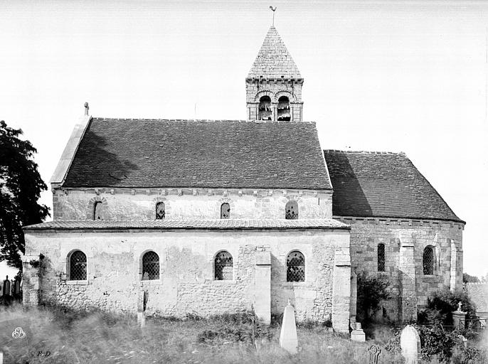 Elévation sud au début du XXe s.